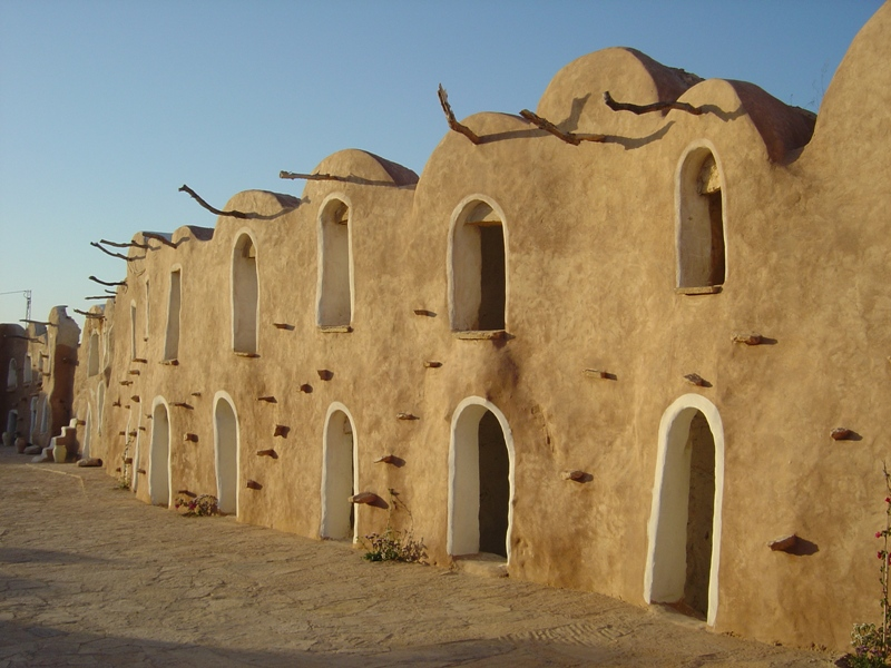 Source : Oeuvre personnelle Auteur : Adel BARHEM Lieu : Ksar Ouled Debab. Date : 7 avril 2006 Commentaire : Ksar berbère Appareil photo : Sony P10